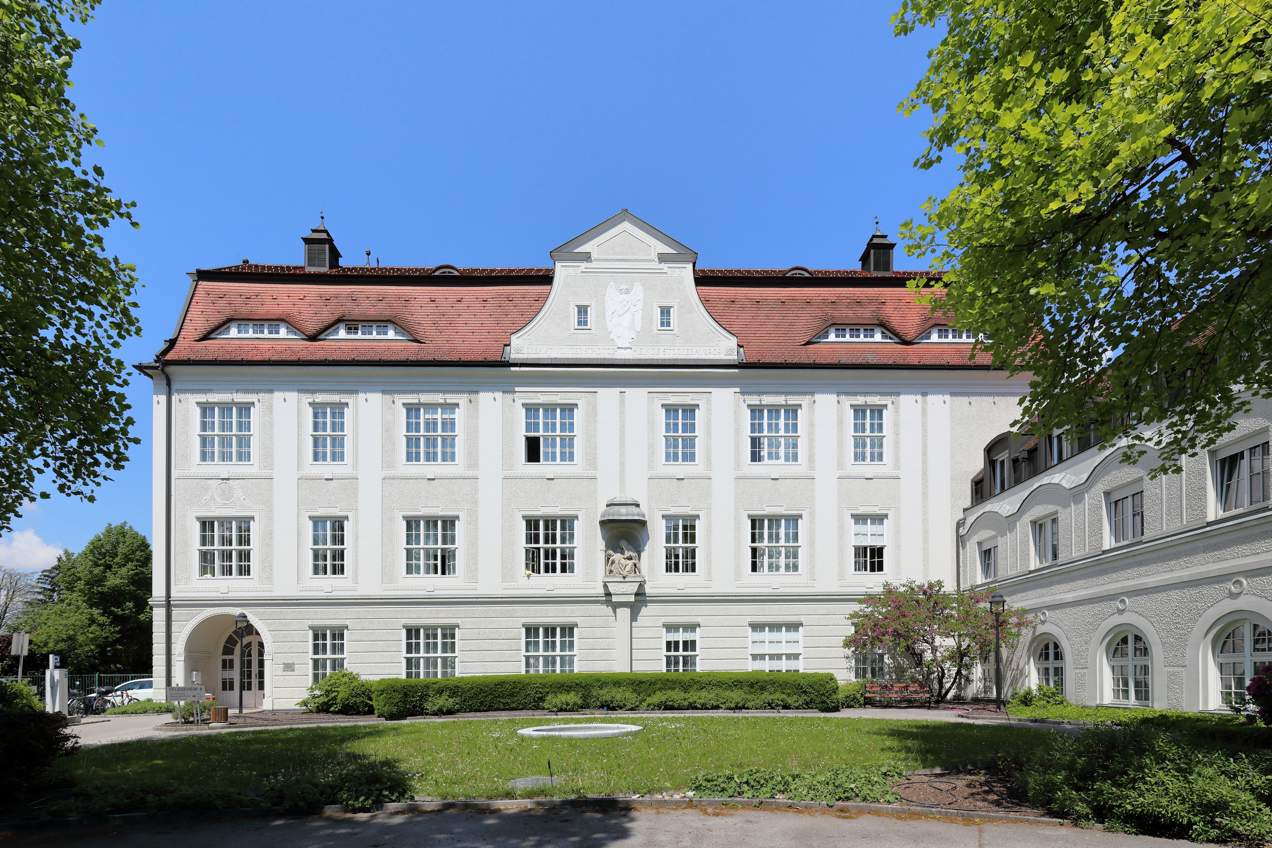 Das ehemalige Krankenhaus und jetzige Pflegeheim der niederösterreichischen Stadt Stockerau.Das im Jahr 1773 eröffnete und mehrfach vergrößerte Krankenhaus hat eine späthistoristische Fassade. Von 1993 bis 1995 wurde das Krankenhaus zu einem Pflegeheim umgebaut.